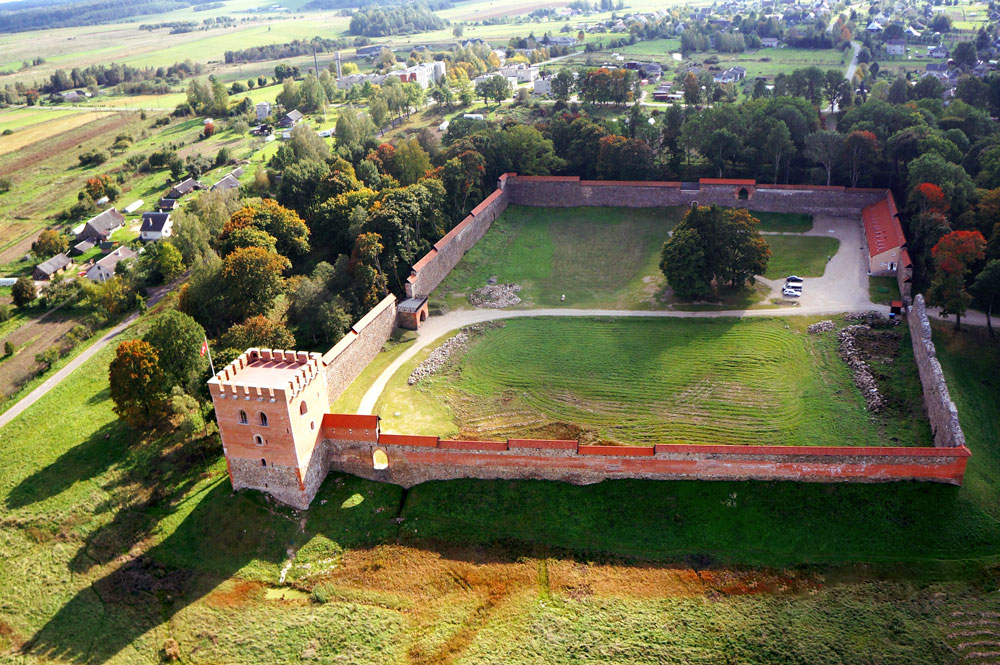 Medininkų pilies vaizdai iš dangaus